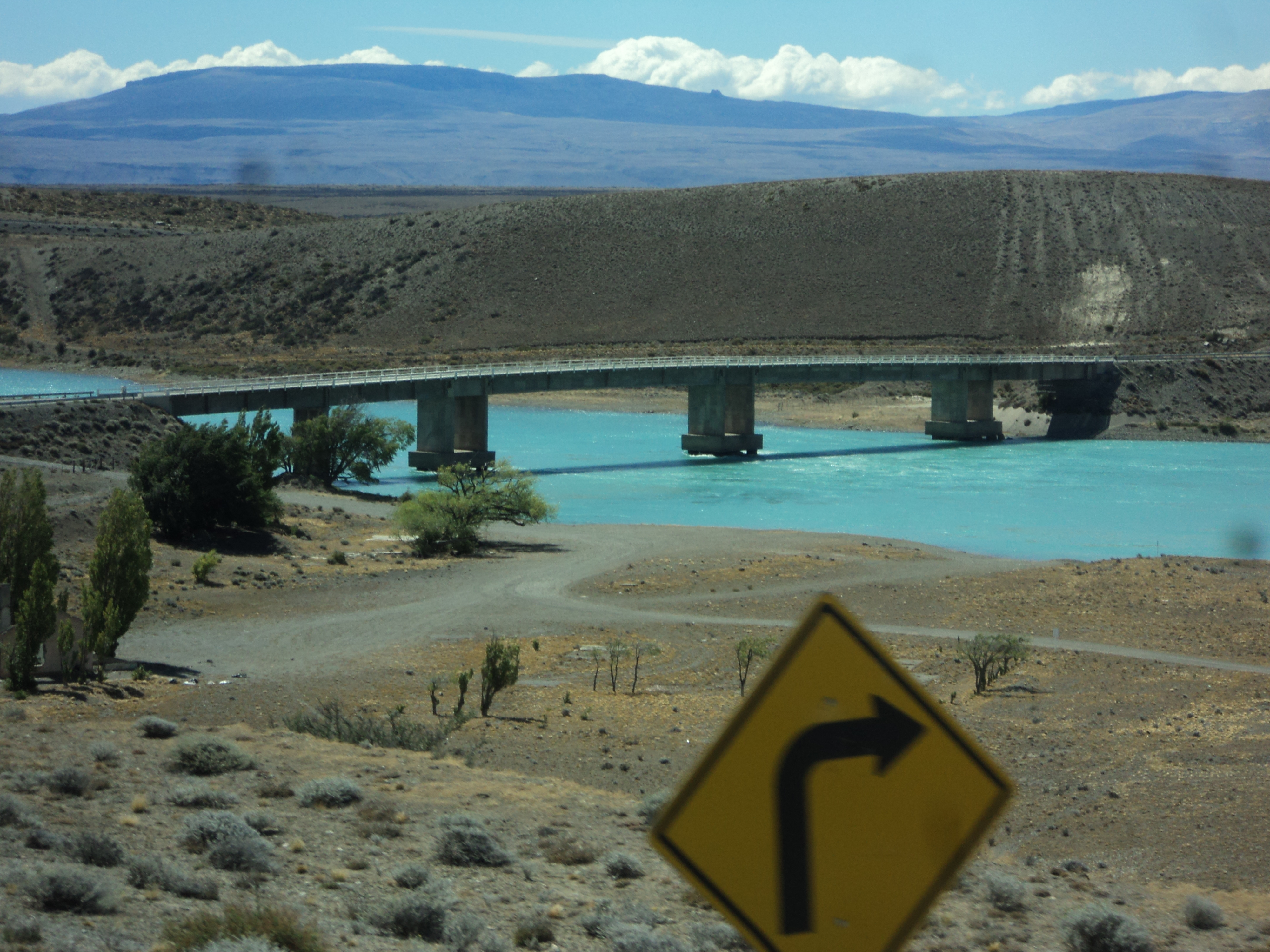 Rio caudaloso que nace en el Lago Argentino y desemboca en el Mar Argentino. Vista desde la ruta que va a la ciudad de Calafate.